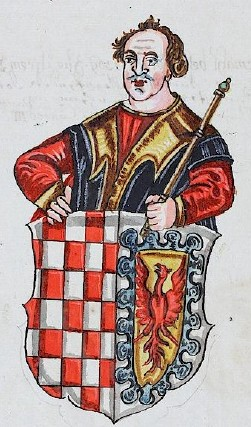 Konrad III. Graf von Freiburg und Neuenburg